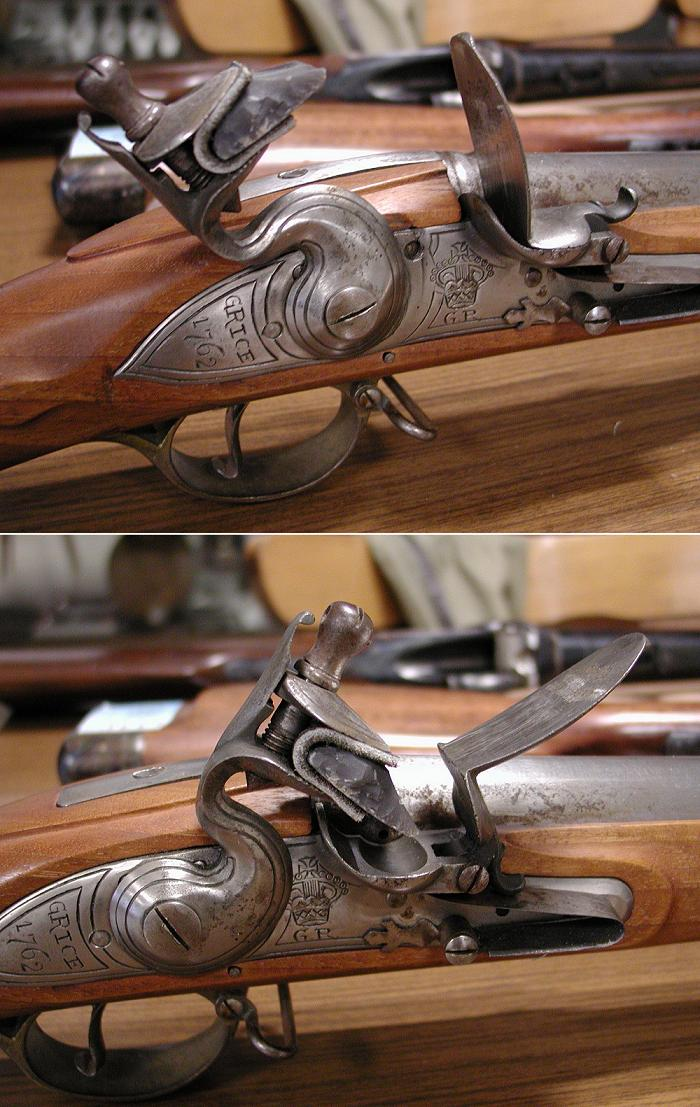 Verschluss der Muskete Brown-Bess oben: Verschluss gespannt unten: Verschluss nach Auslösen